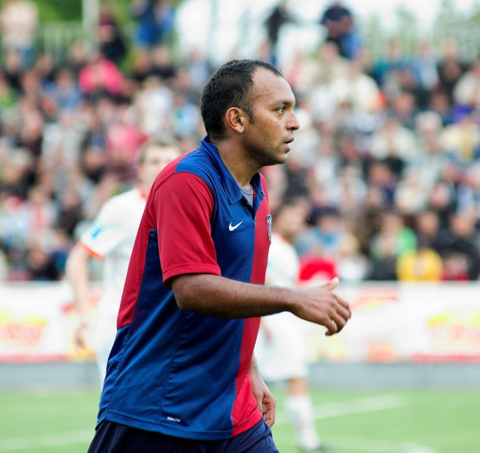 Жоземар дос Сантос Силва — бразильский футболист, нападающий.